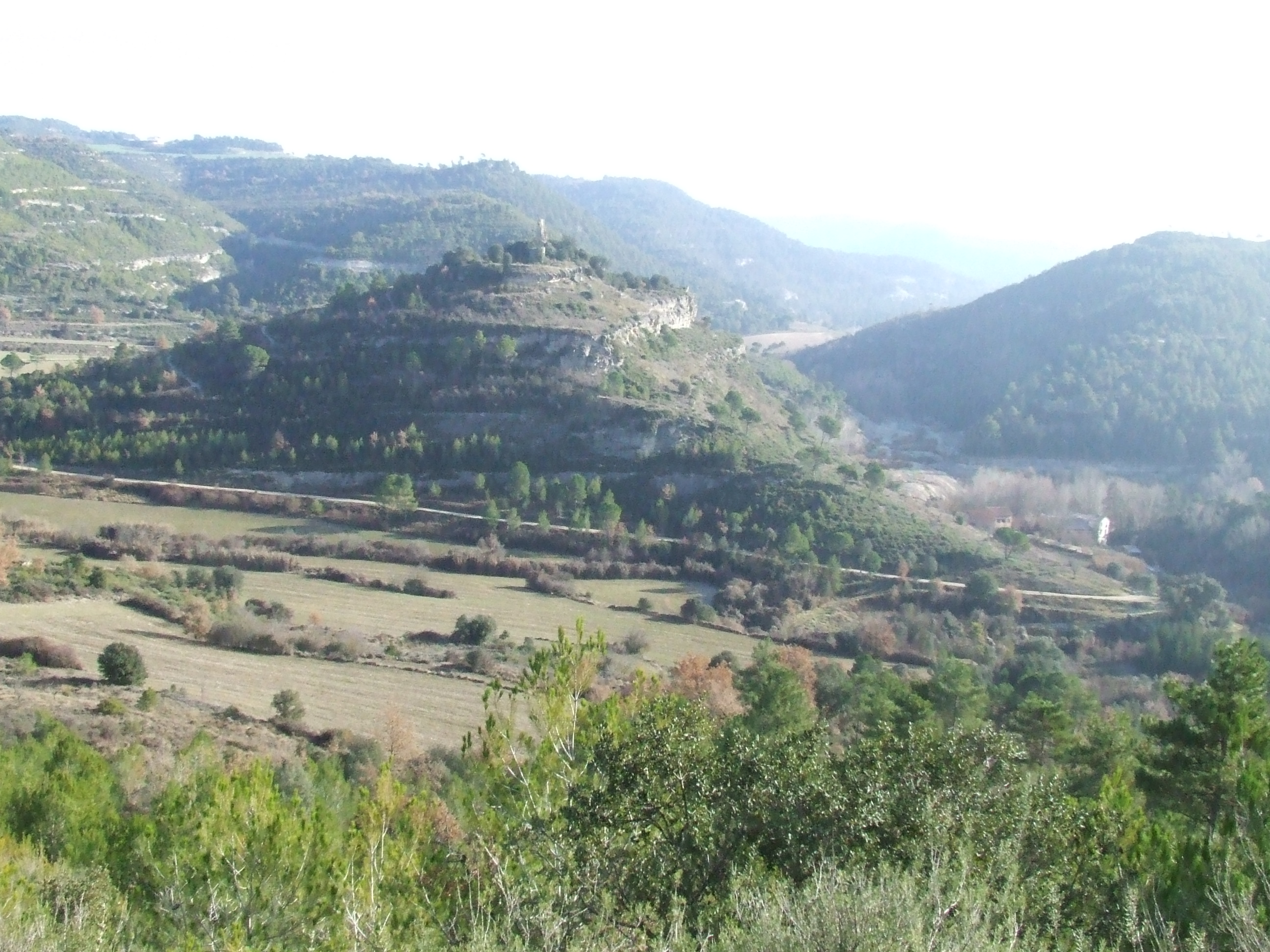 El castell de Calders i l'antic meandre del riu des del Bac del Molí, en plena baixada del GR 177.